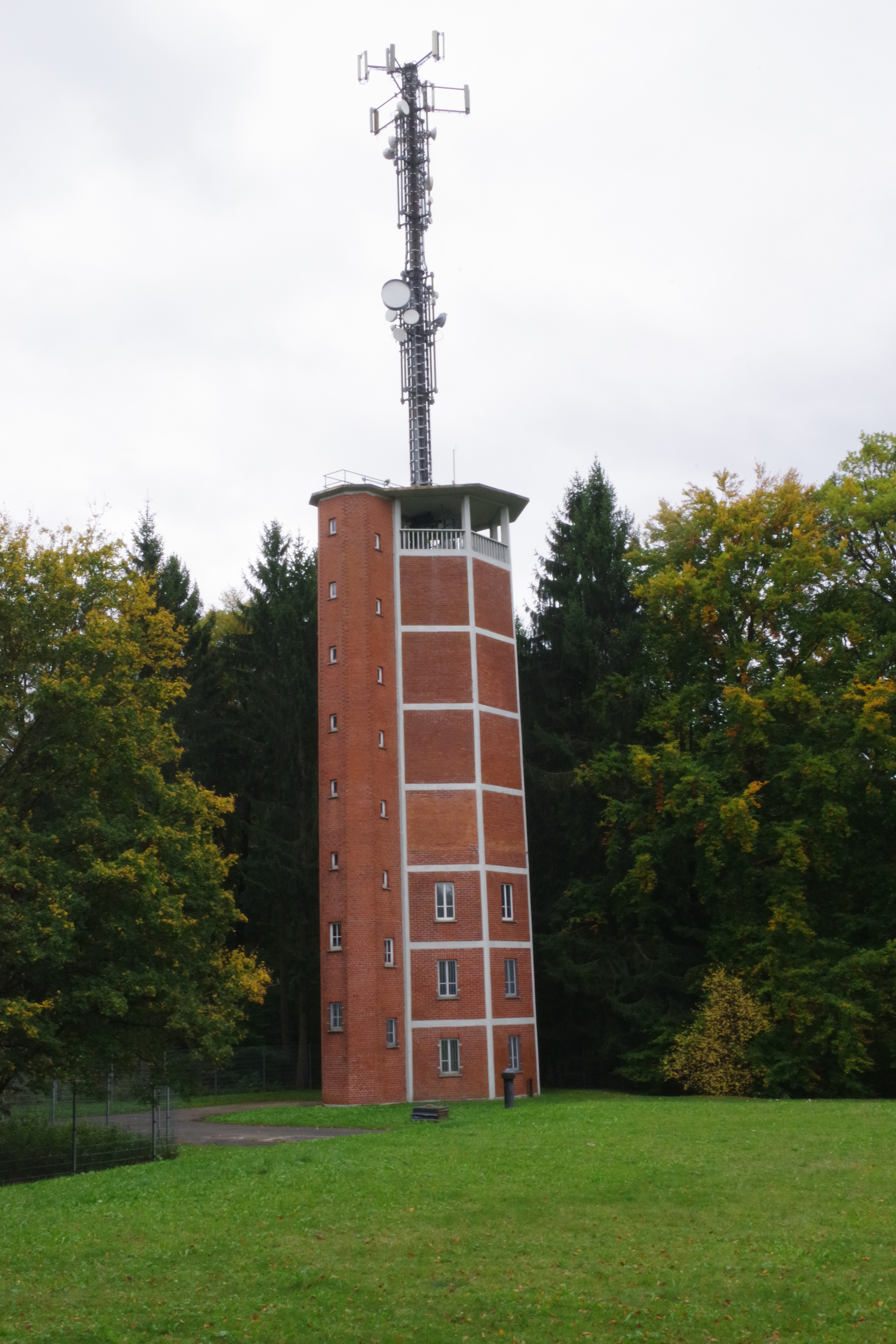 Der Wasserturm Sindelfingen-Eichholz, fotografiert am 2. Oktober 2017.